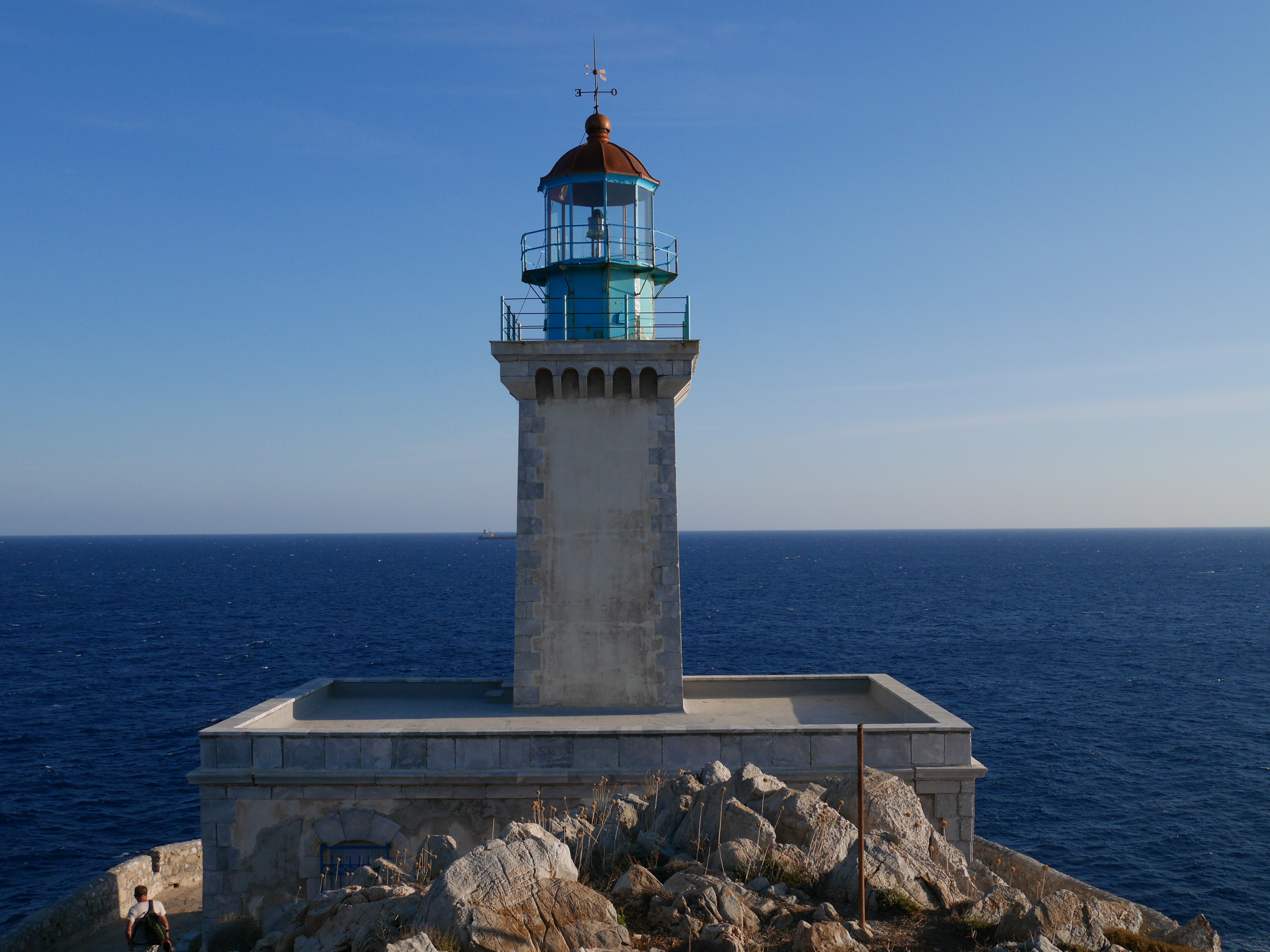 Le phare du cap Matapan ou Ténare (Ακρωτήριο Ταίναρο)